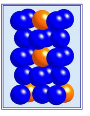 Ordezko disoluzio solidoa